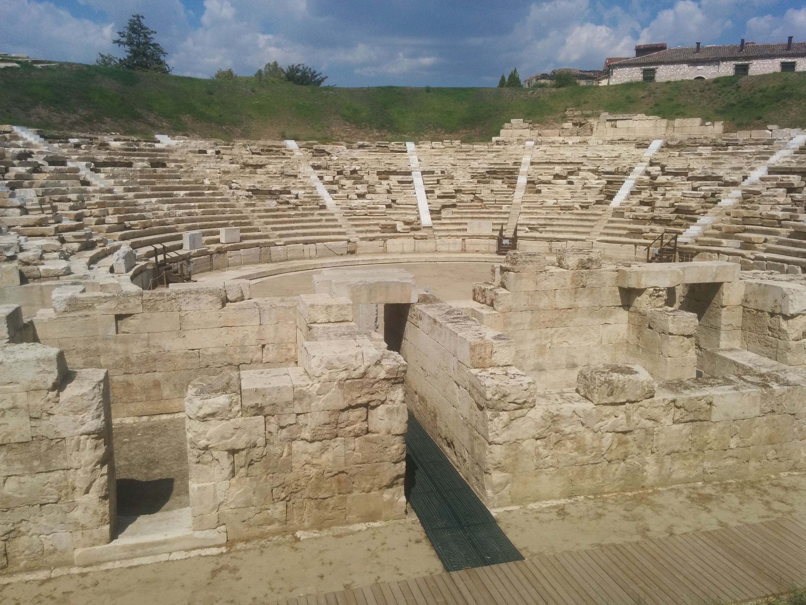 Αρχαίο θέατρο Β΄ Λάρισας«Αρχαίο θέατρο Β΄ Λάρισας»